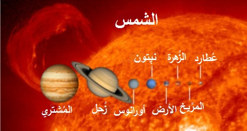 رسمٌ لِكواكب المجموعة الشمسيَّة.